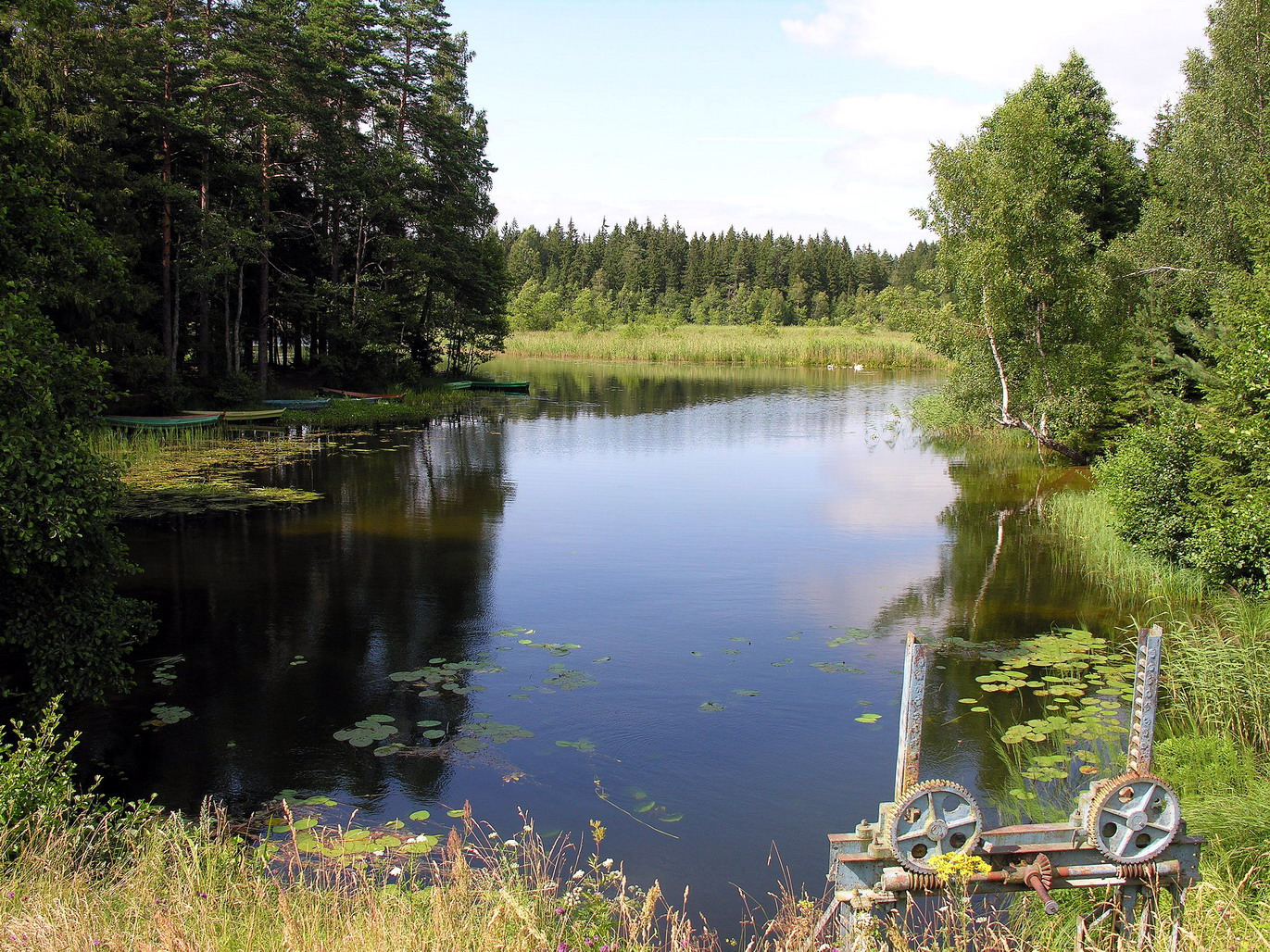 Žemaitėška: bat-smg:Laumalėnkas ežers (lt. Laumalenkos ežeras), apatiuo, dešinie posie īr praloida, pro katruo pradeda tekietė Babrungs. bat-smg:Žemaitėjės naciuonalėnis parks Puortegrapėje Algirda, 2007-07-23, bat-smg:Žemaitėjė